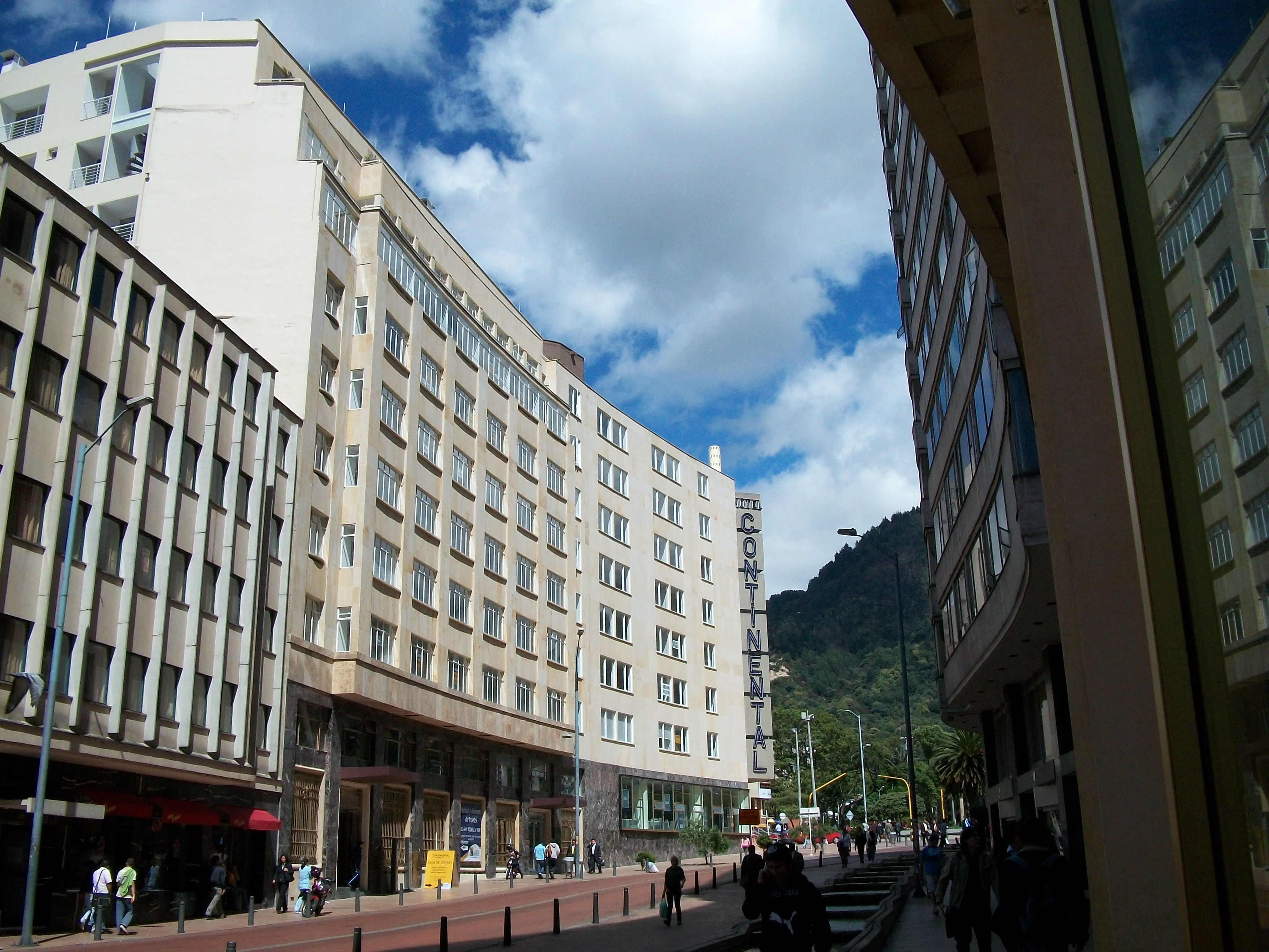 Hotel Continental, ahora edificio residencial y de oficinas, en el eje Ambiental con carrera Quinta. Bogotá.